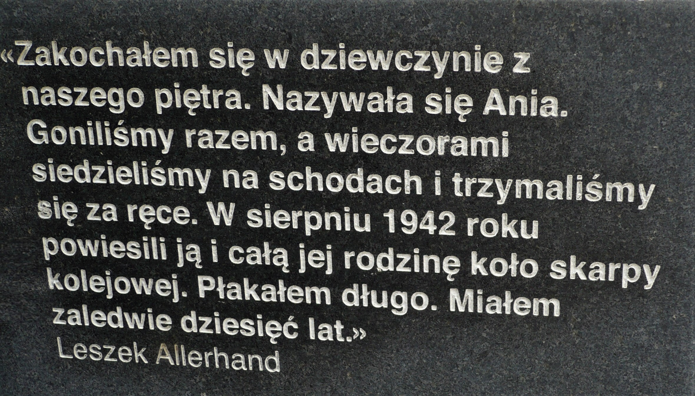 Synagoga Złota Róża we Lwowie. Pomnik